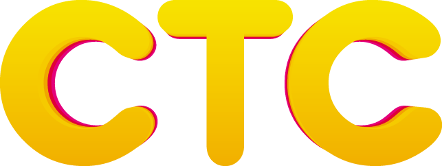 Седьмой логотип телеканала «СТС»